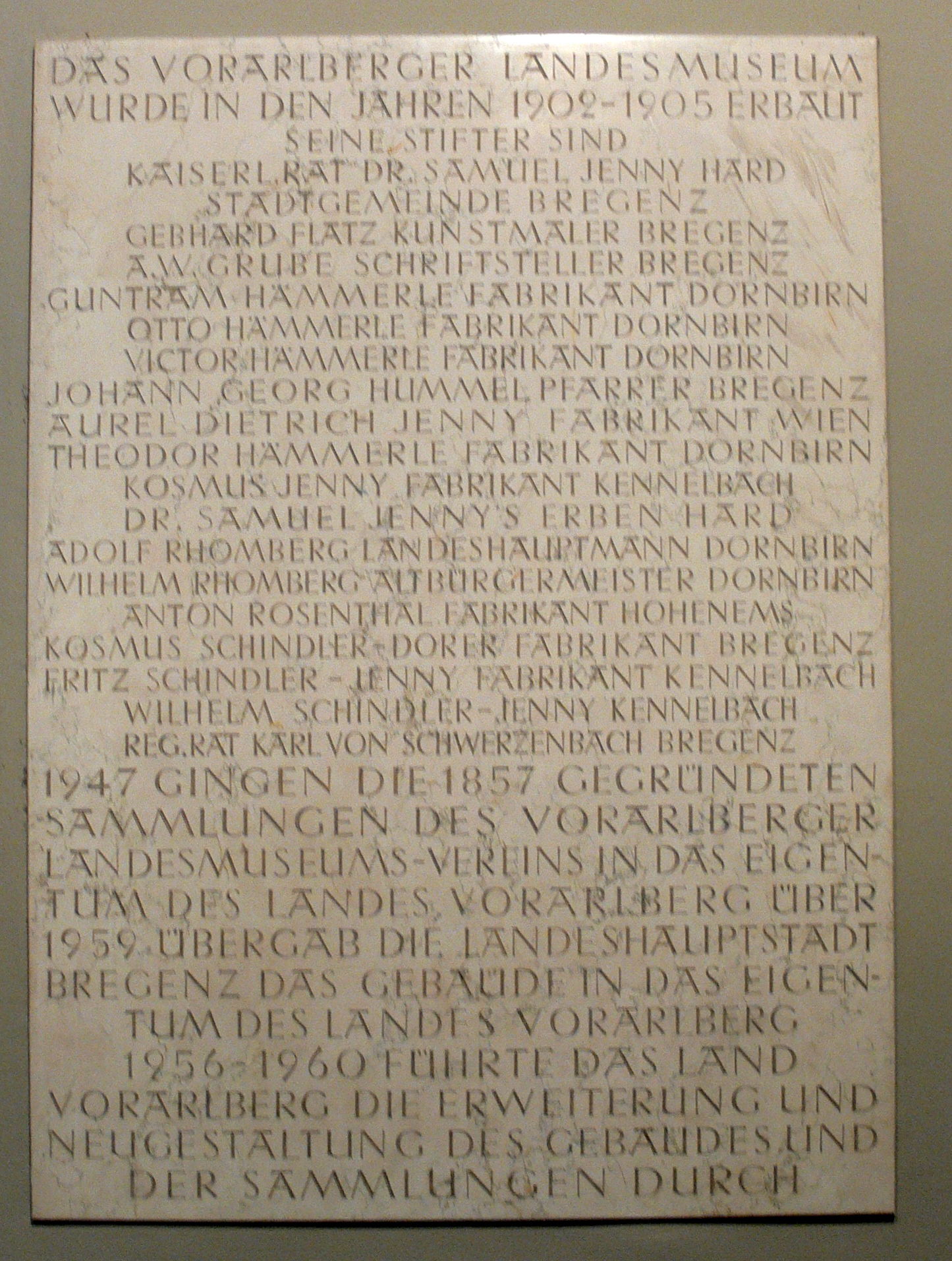 Vorarlberger Landesmuseum, Bregenz Tafel zur Geschichte des Museums im Eingangsbereich